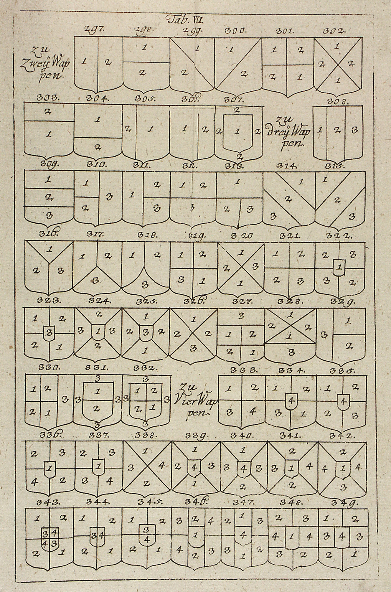 A címerlerás sorrendje.